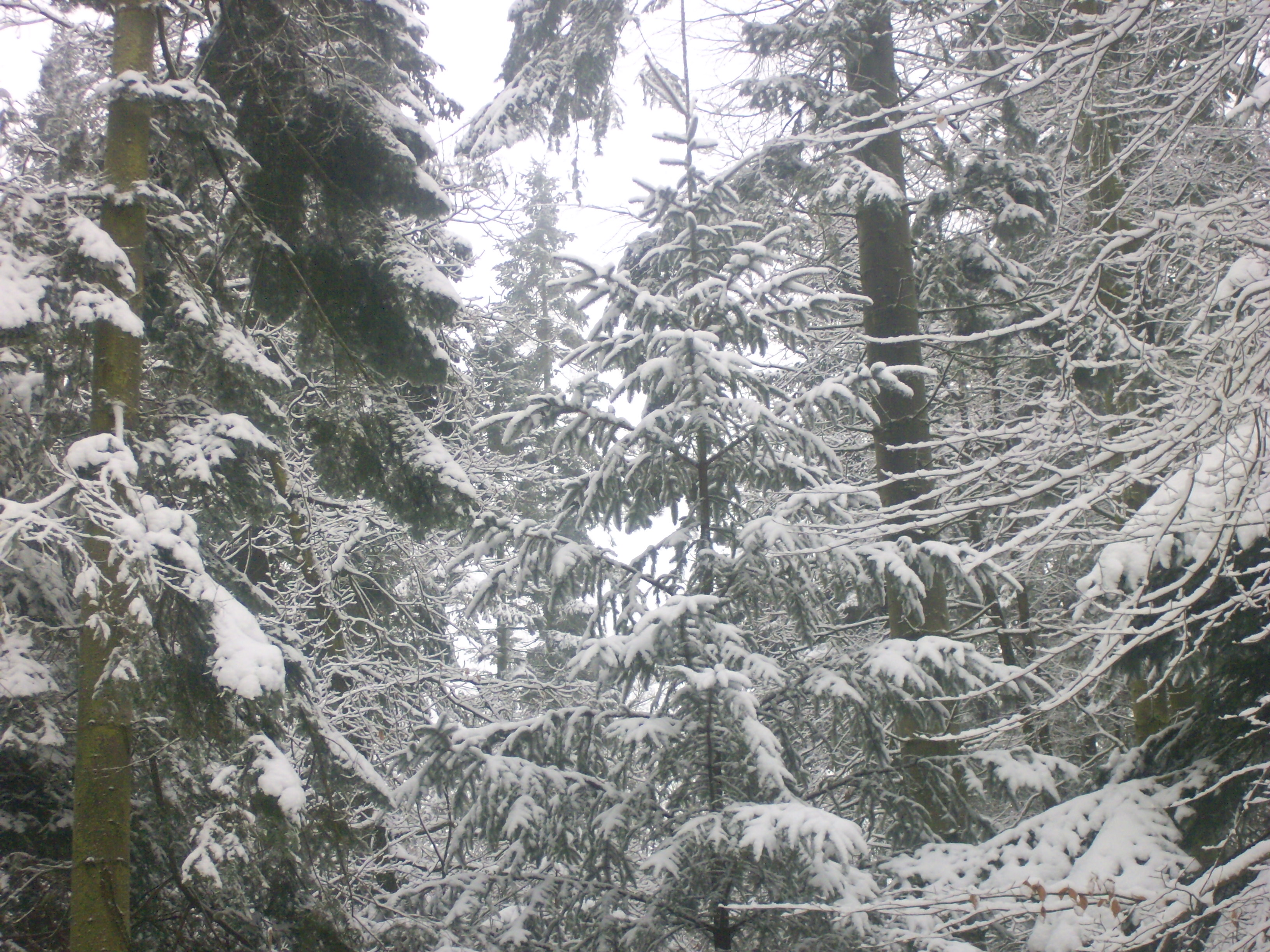 Winter im Klueser Wald